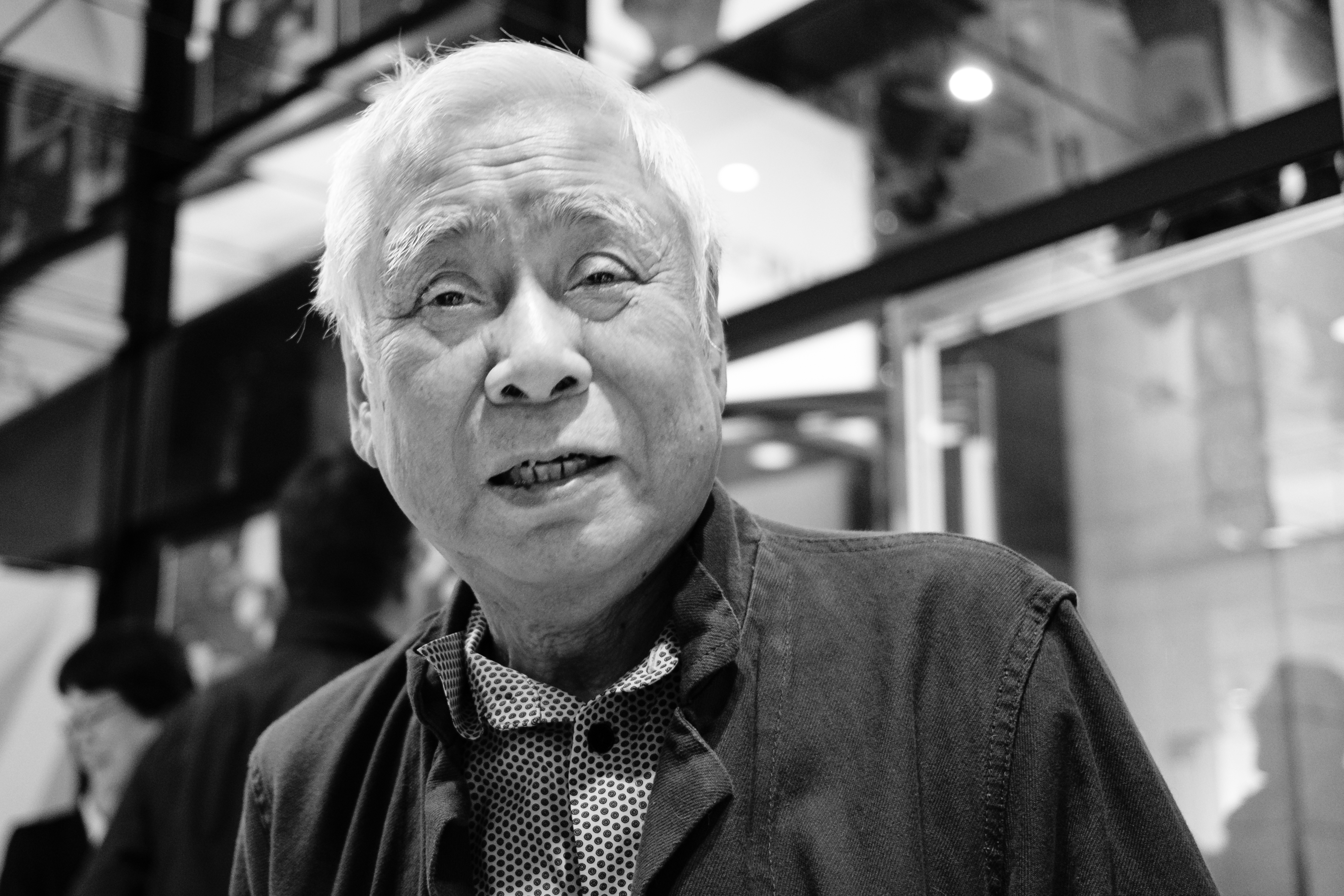 仲條正義（グラフィックデザイナー）